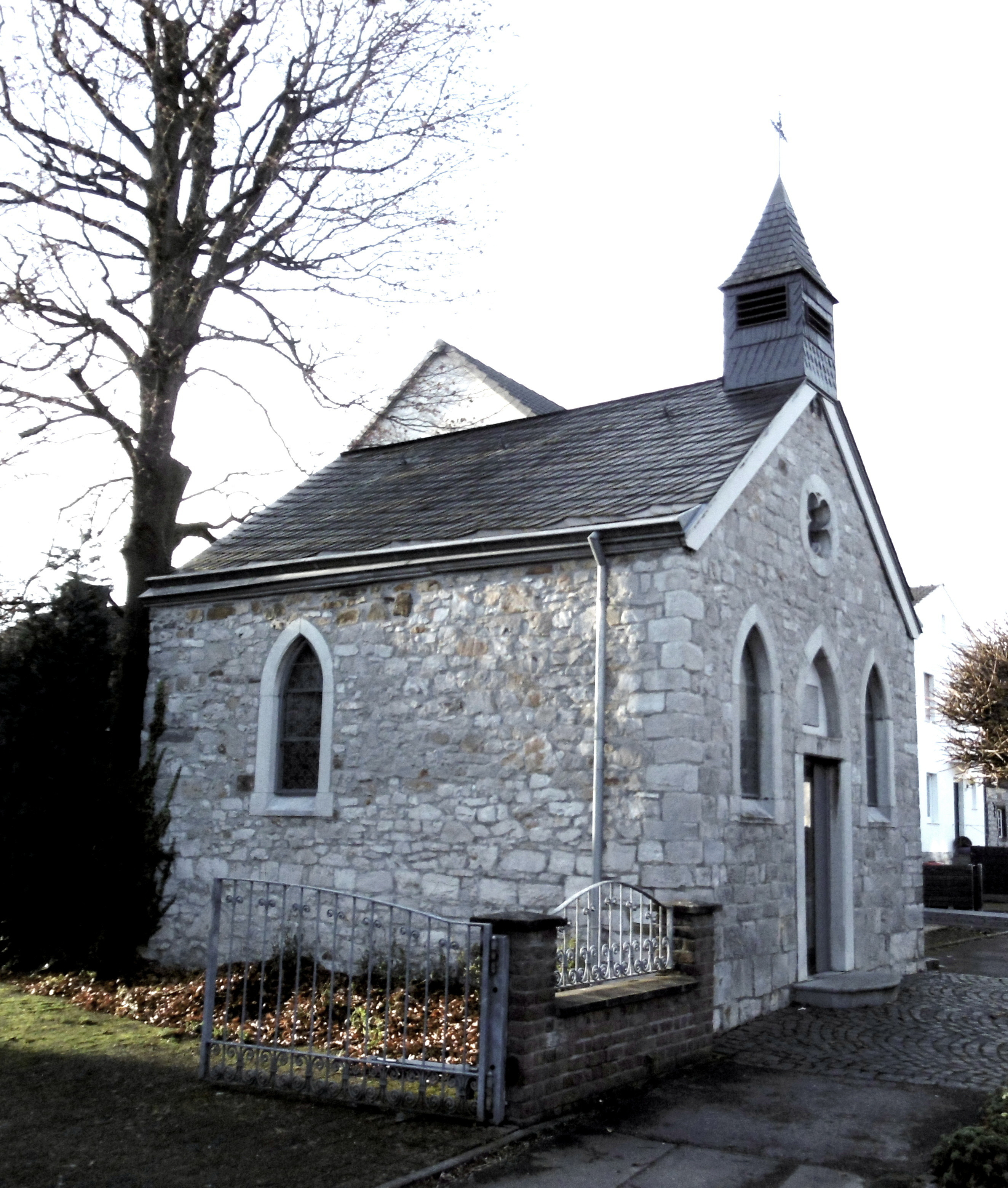 Vincenzkapelle in Aachen-Brand-Niederforstbach